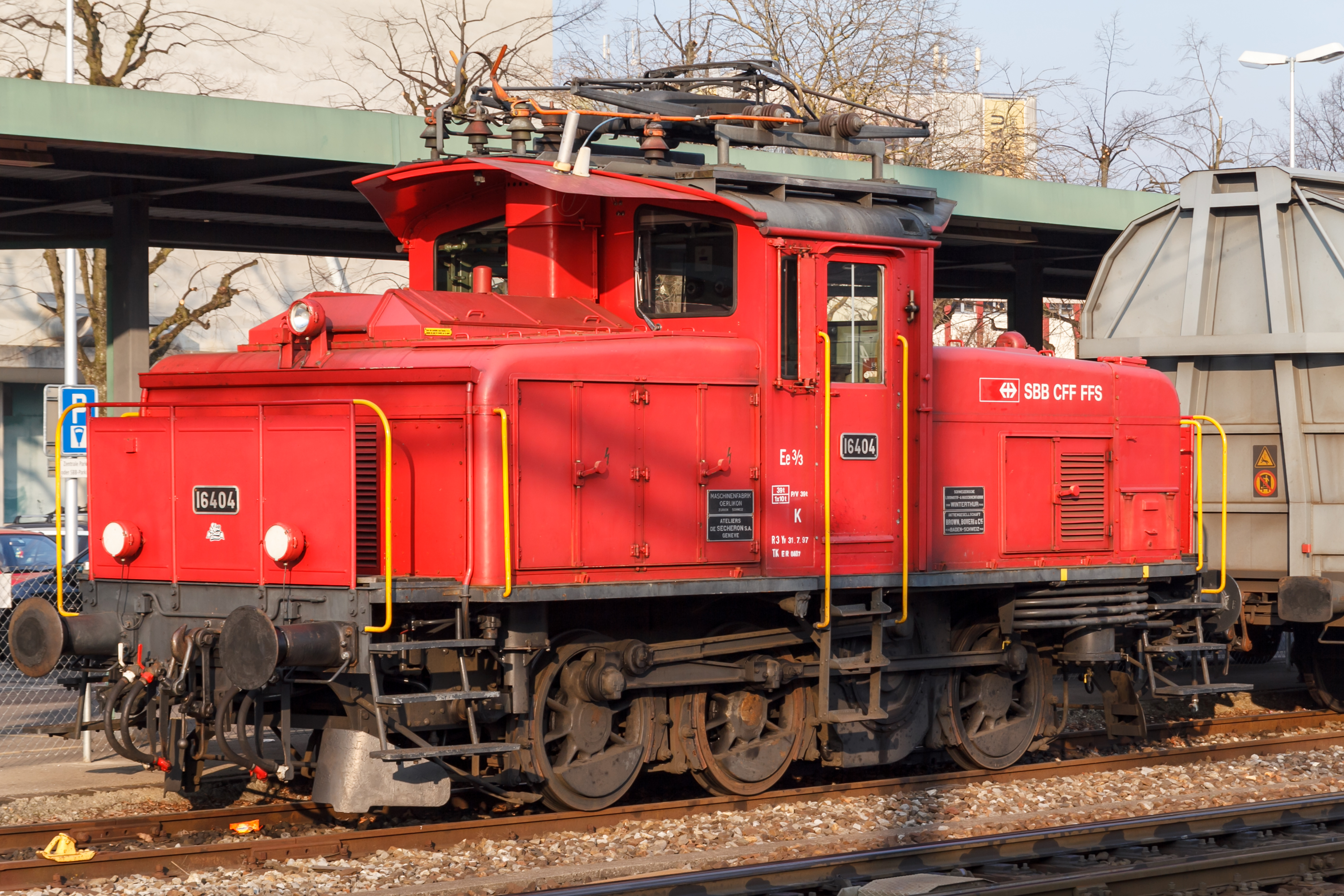 Elektr. Rangierlok SBB Ee 3-3 Nr. 16404 in Gossau SG